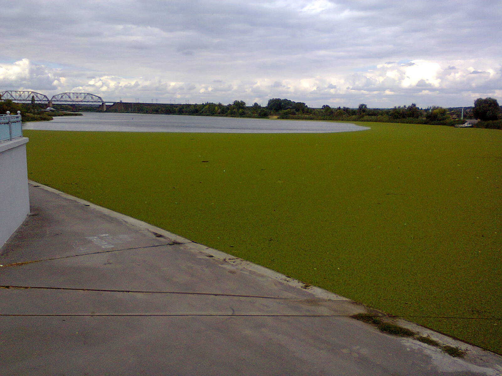 Ряска на реке Северский Донец в г. Каменск-Шахтинский